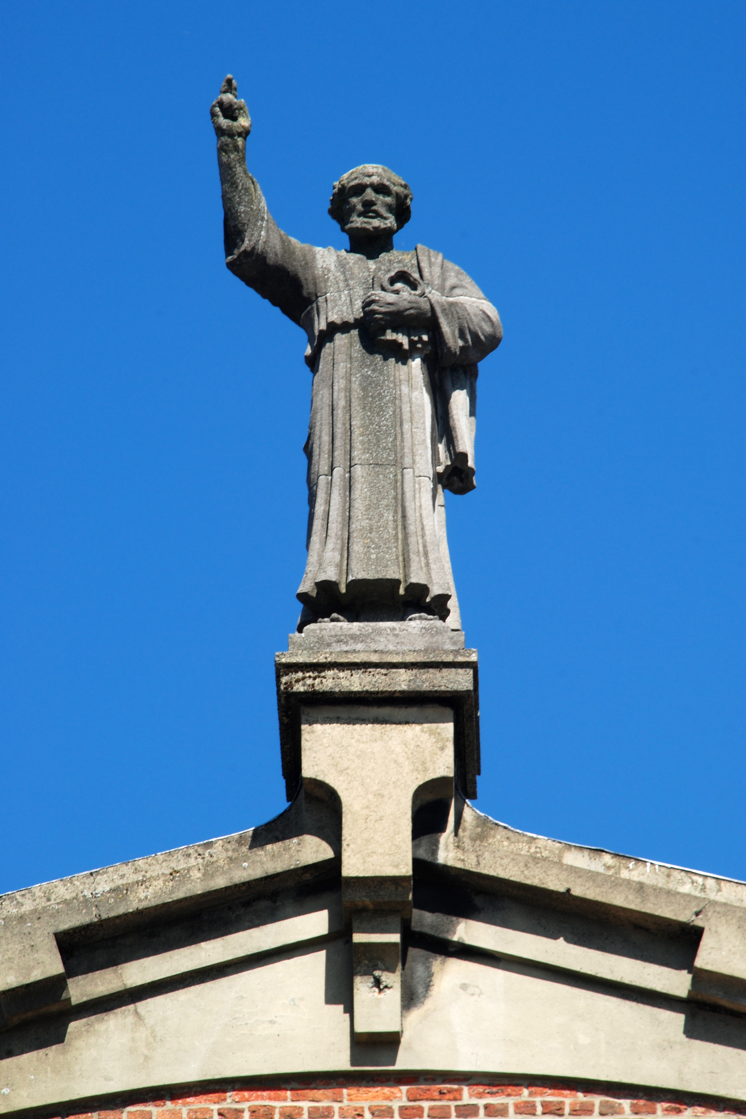 Belgique - Brabant wallon - Rixensart - Genval - Église Saint-Pierre de Maubroux